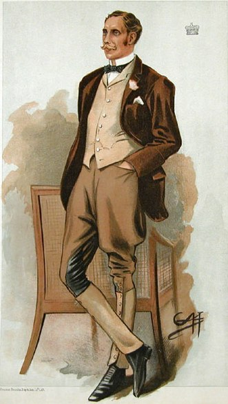 Henry de Vere Vane Barnard